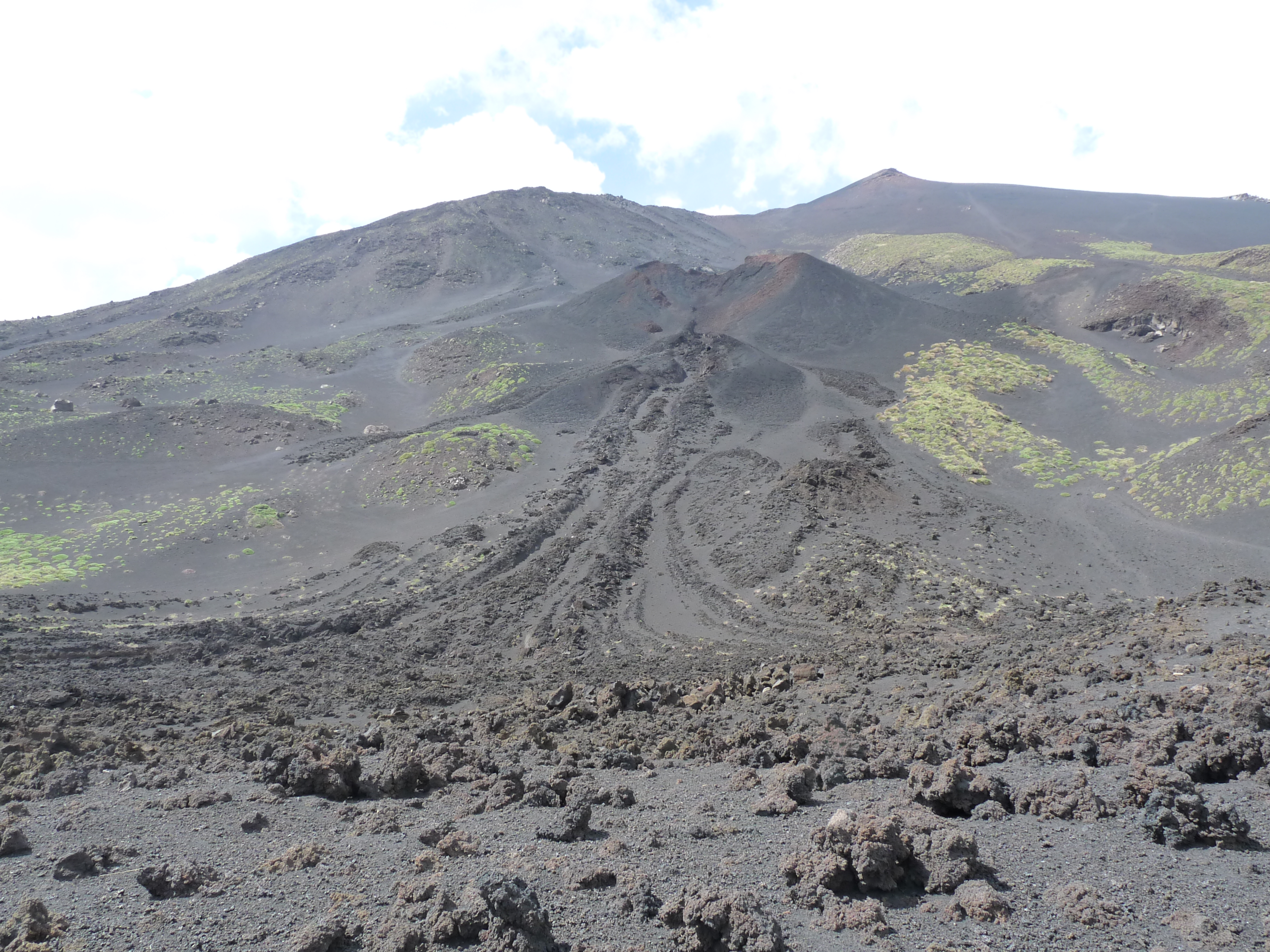 Fissure et coulée de lave de juillet 2001 sur le versant Sud de l'Etna (La Montagnola)